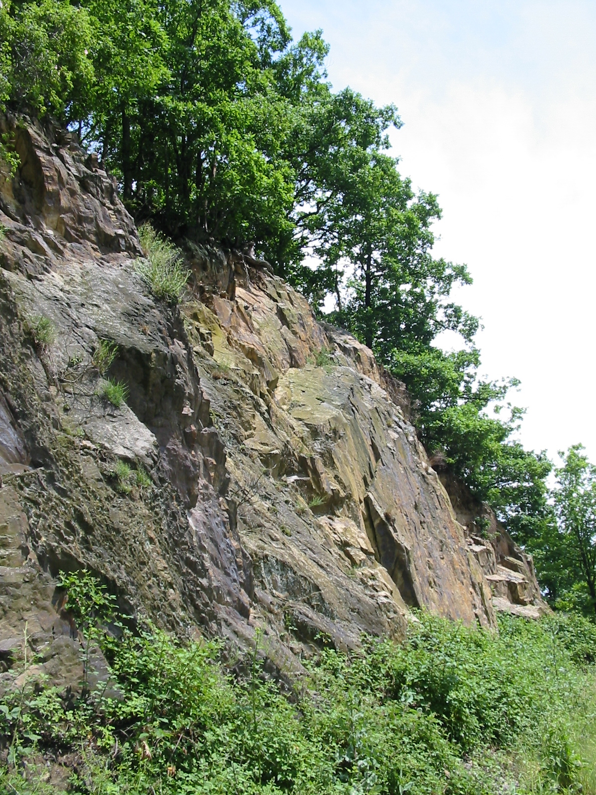 Rocks at Eschauel, near Woffelsbach / Eifel, Germany